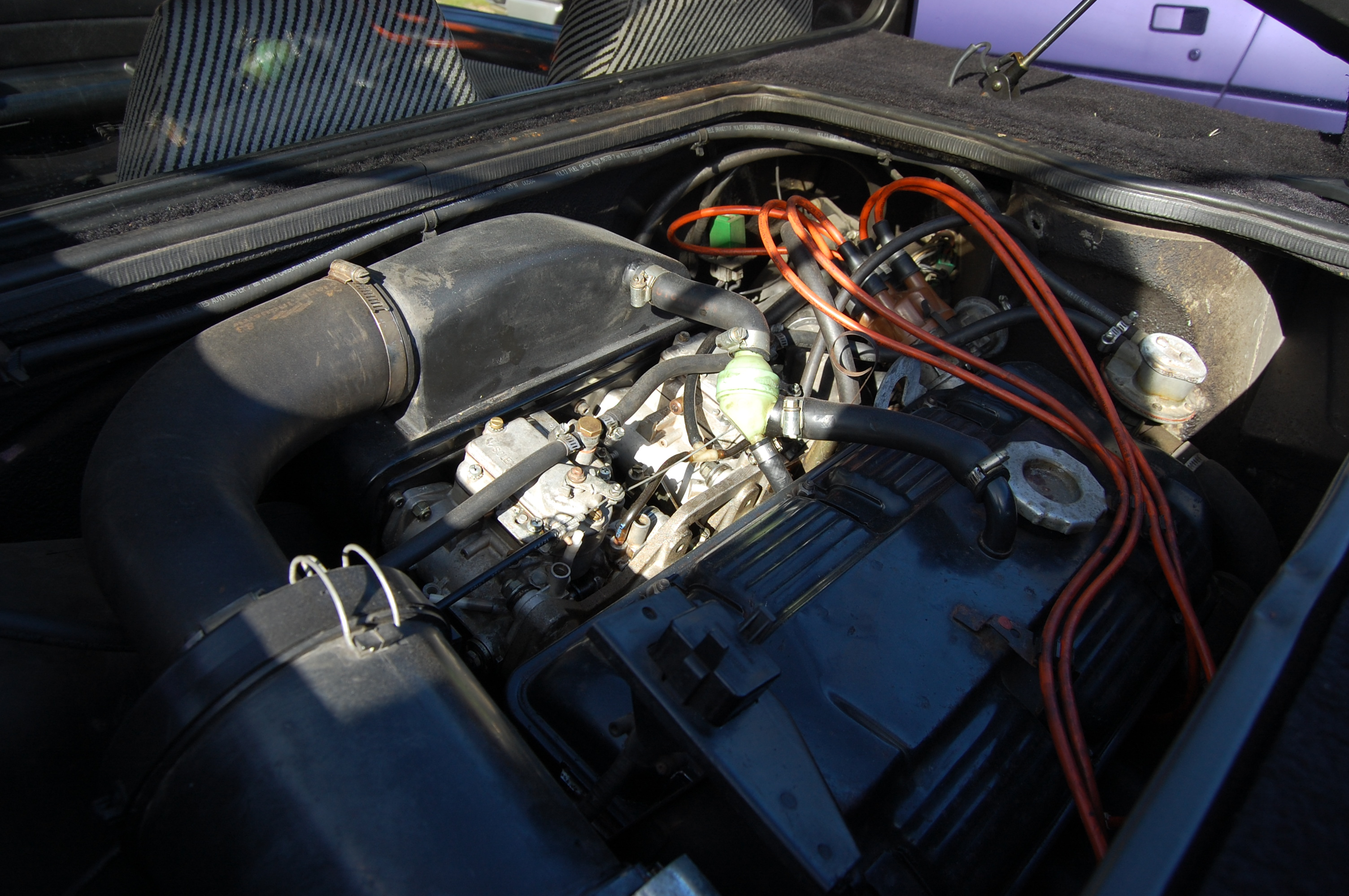 Engine bay, Matra Murena 2.2S (1983)